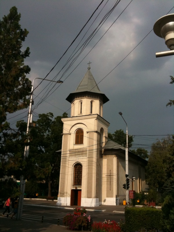 una iglesia de Bârlad